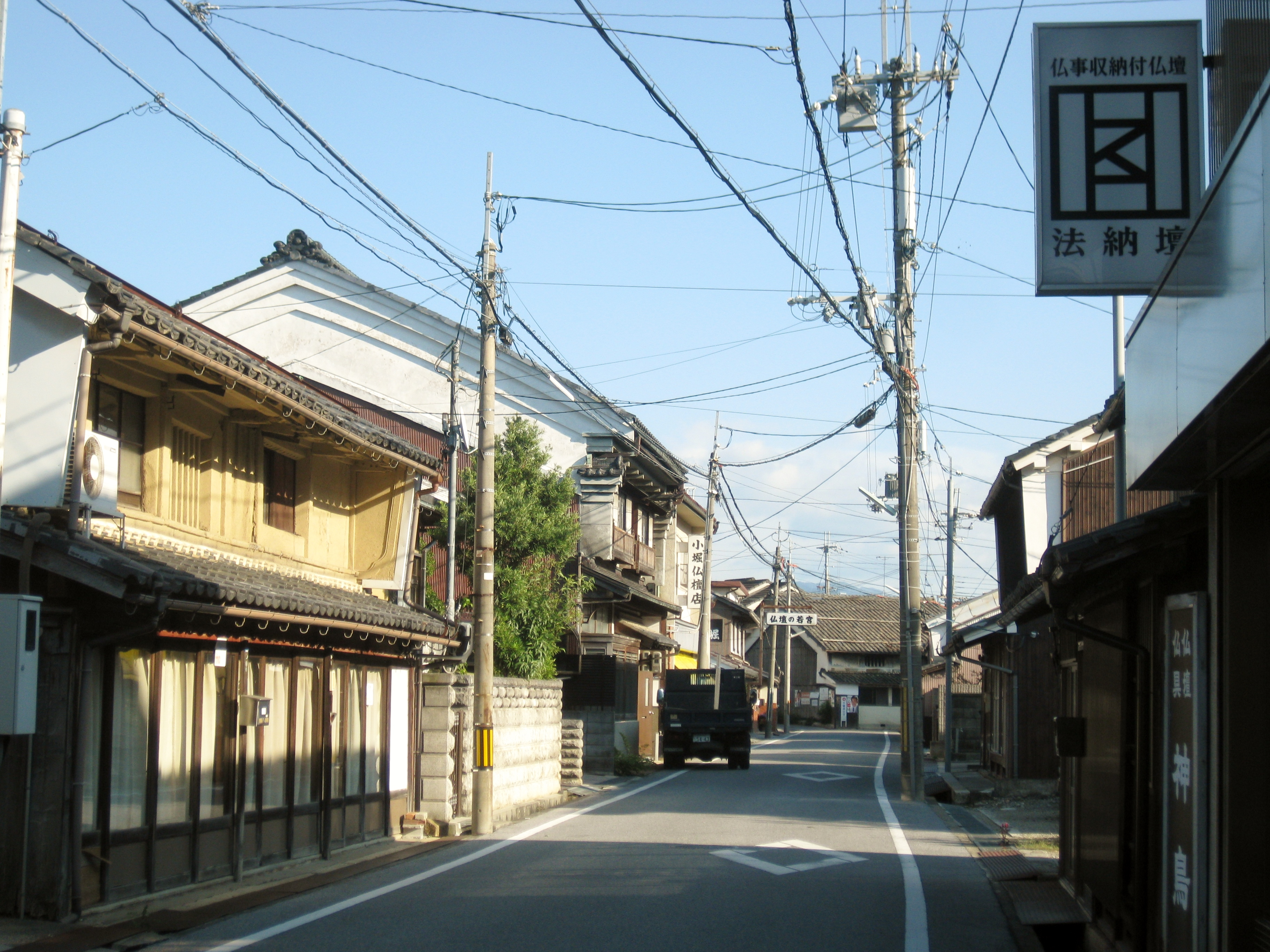 滋賀県彦根市七曲がりの町並み。